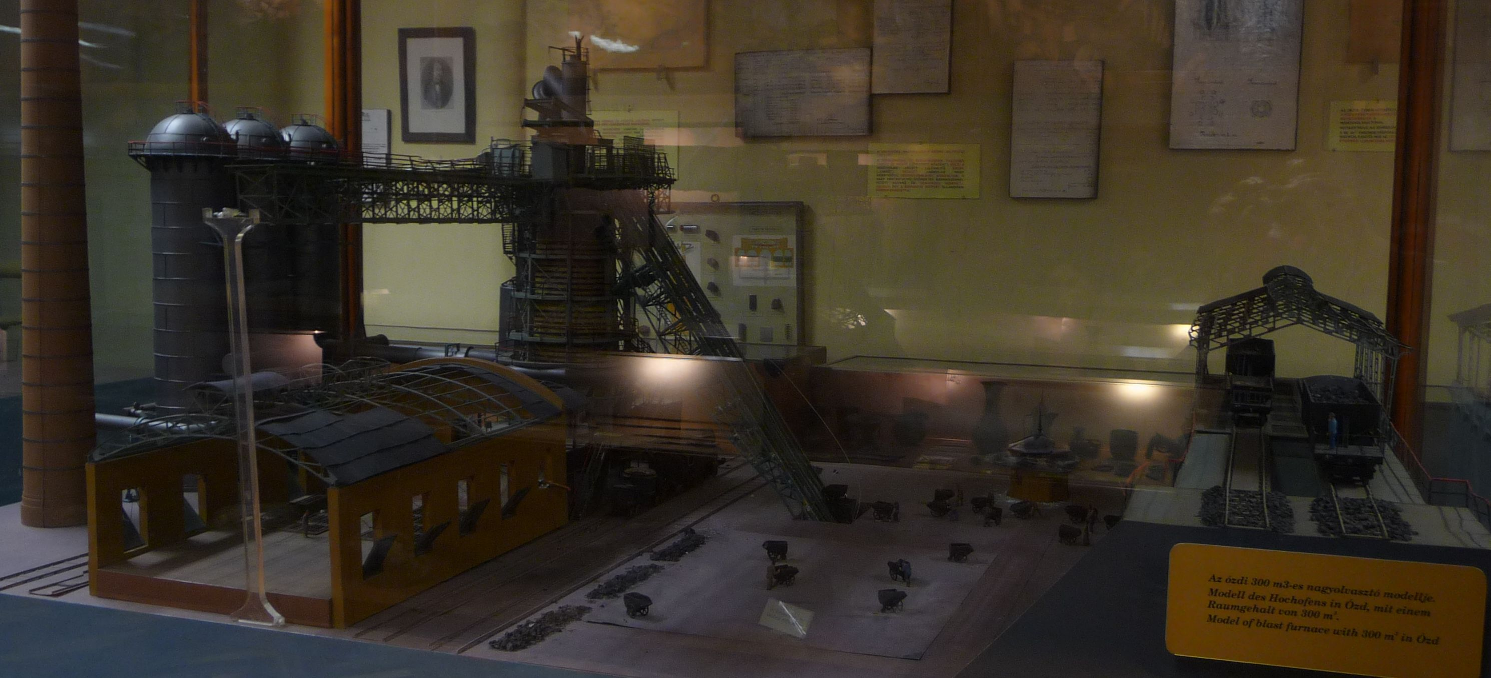 Az ózdi 300 m³-es nagyolvasztó makettje a Kohászati Múzeumban, Miskolcon